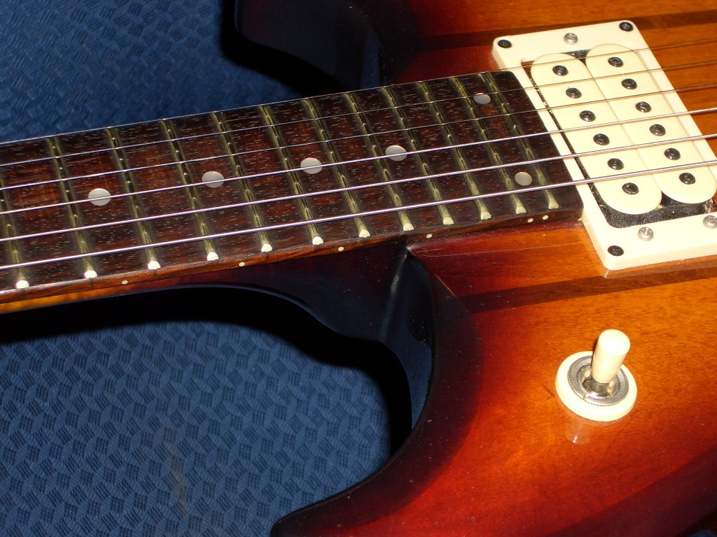 Ibanez_Studio_ST-200_electric_guitar_closeup